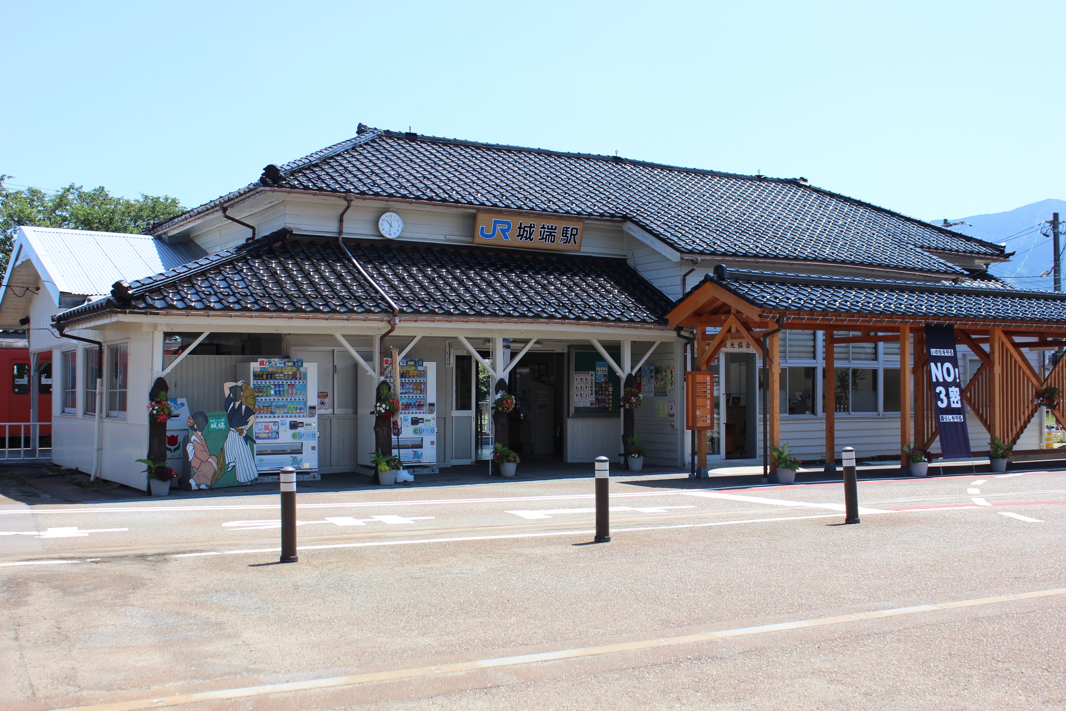 JR城端線城端駅（富山県南砺市） Canon EOS Kiss X5